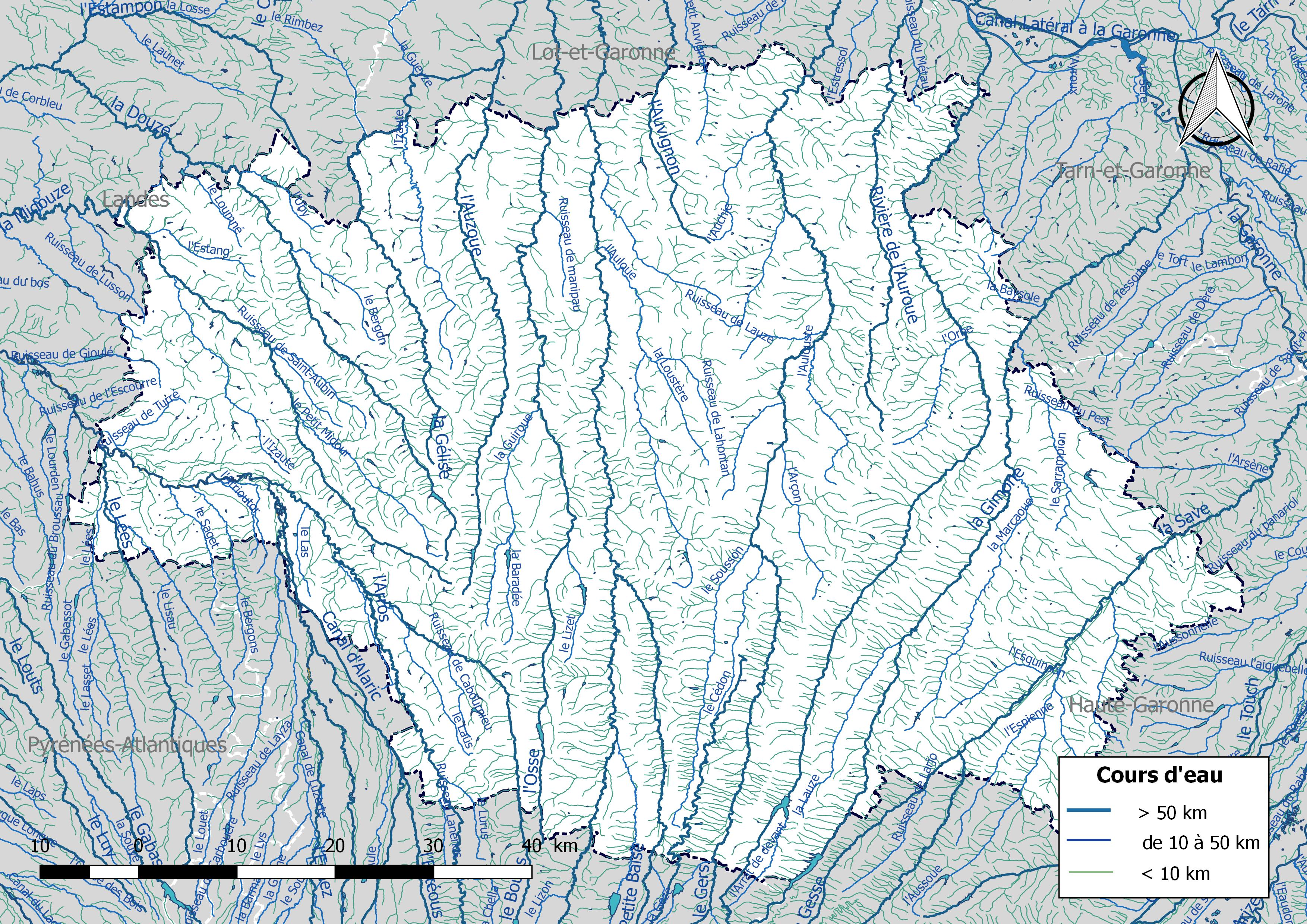 Réseau hydrographique du département du Gers (France).